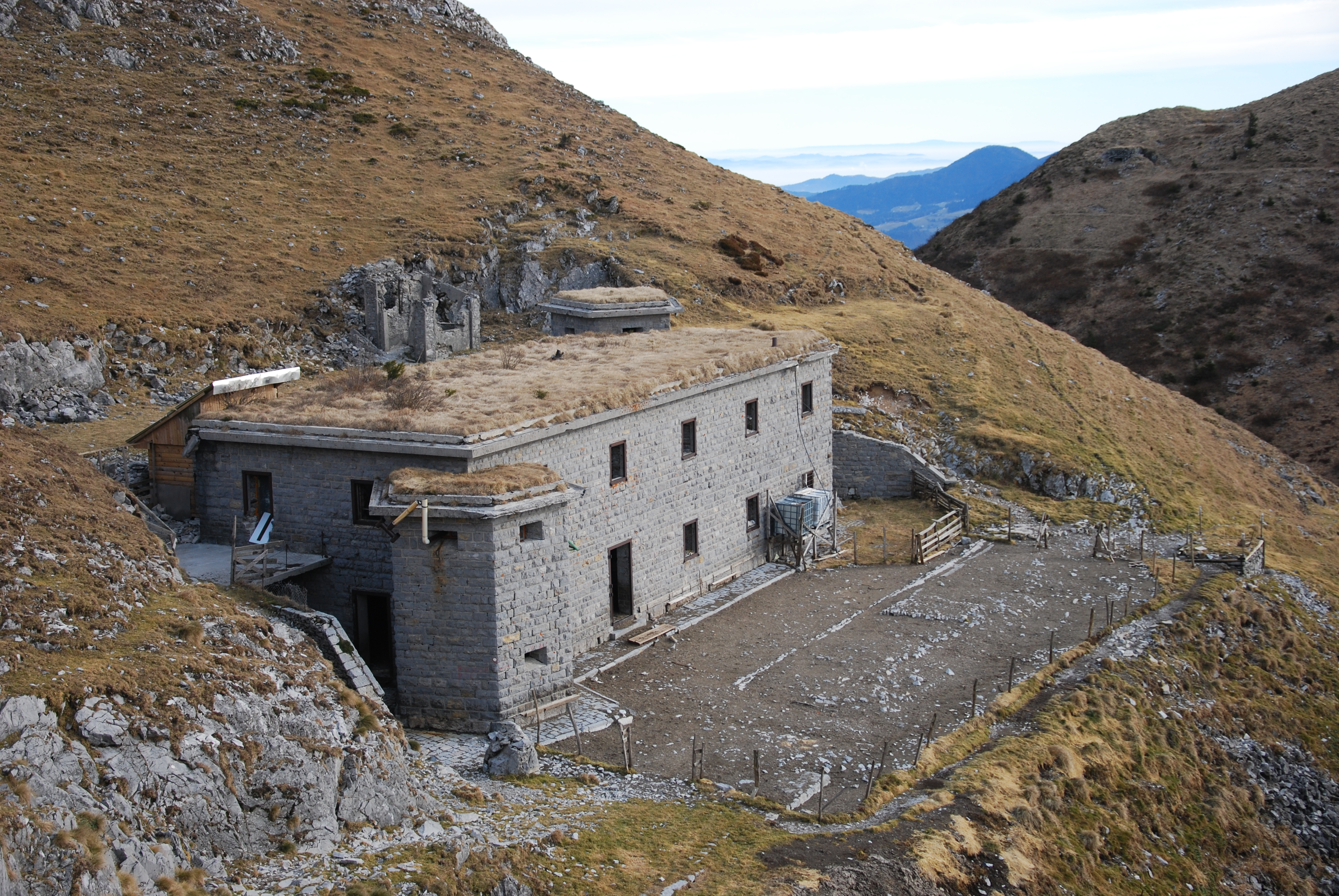 Ostanki nekdanje italijanske vojašnice GAF pod vrhom Slatnika (1609 m), Soriška planina. V času med obema vojnama in med drugo svetovno vojno so bile v njej nastanjene posadke bližnjih bunkerjev danes je v njej hlev in bivališče pastirjev.